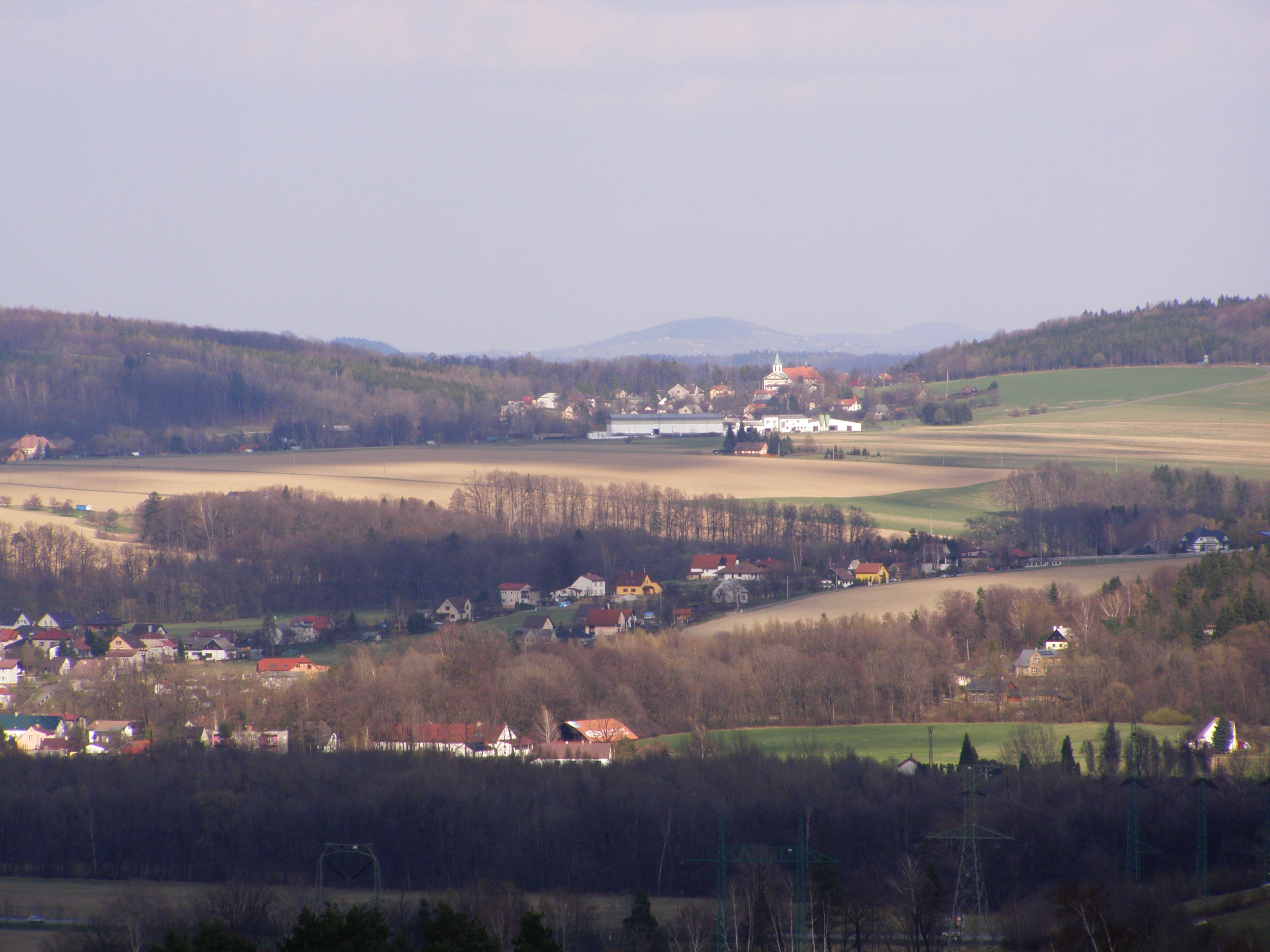 Česky: Frýdecká pahorkatina, v pozadí obec Janovice